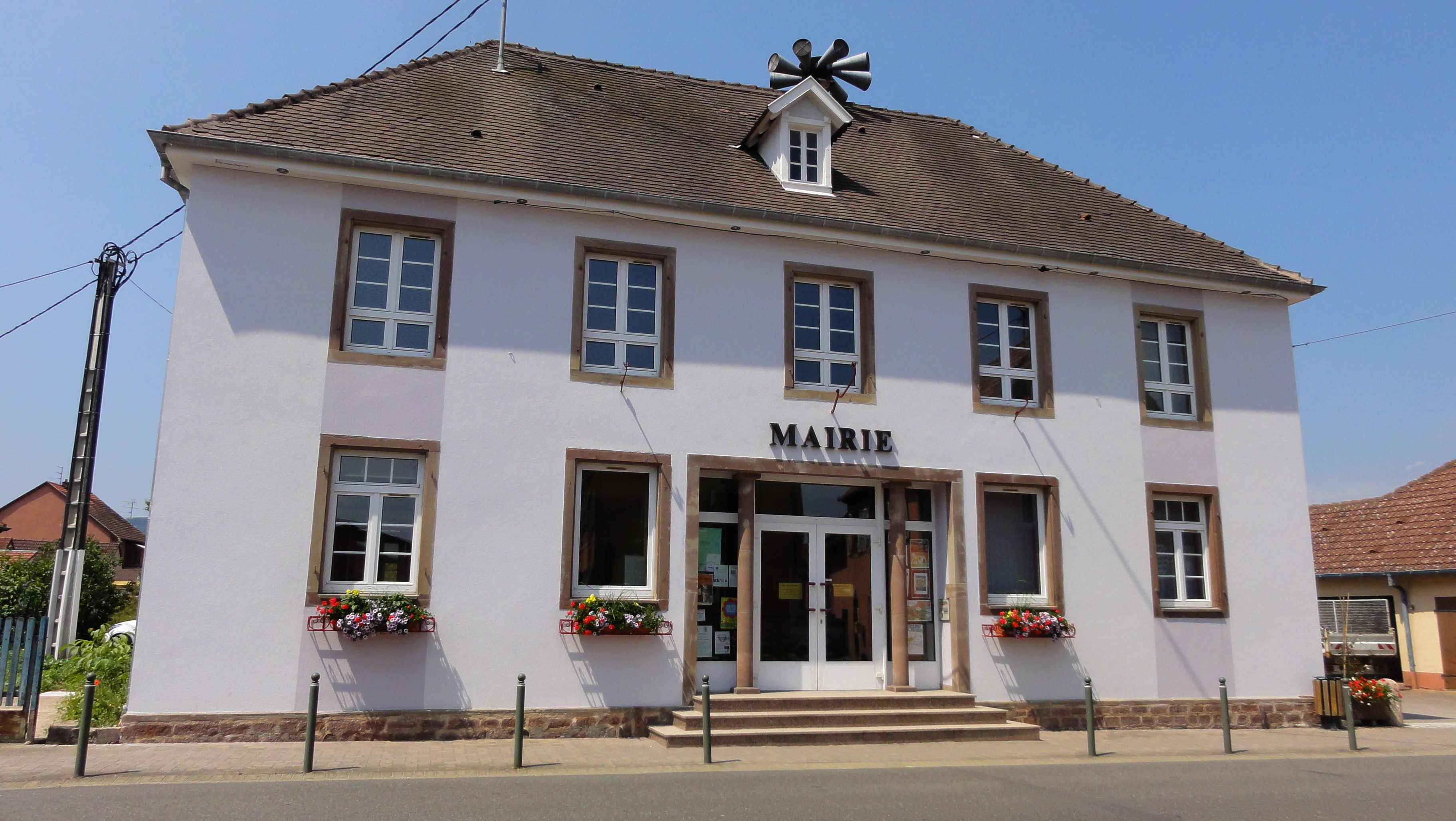 Alsace, Bas-Rhin, Monswiller, Mairie (XXe).